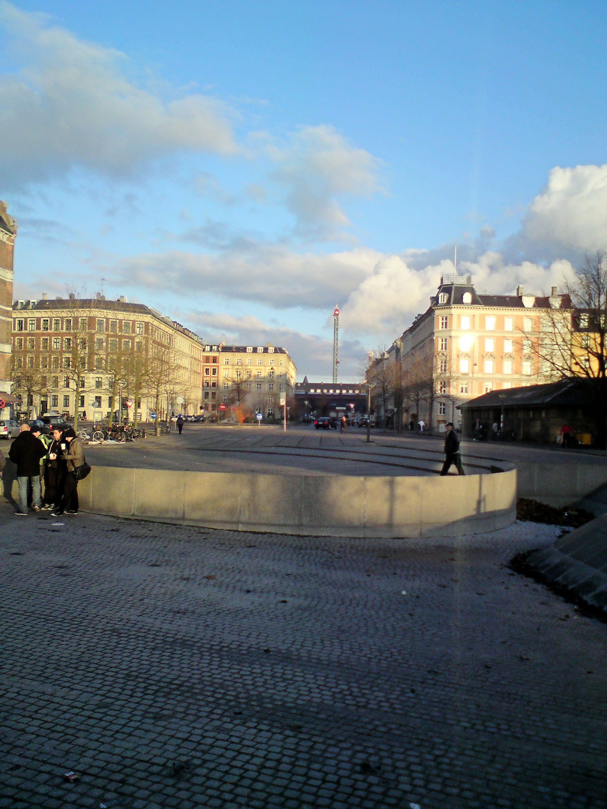 Halmtorvet i Köpenhamn